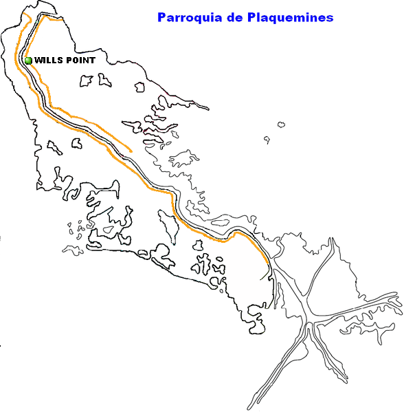 Wills Point, Louisiana.